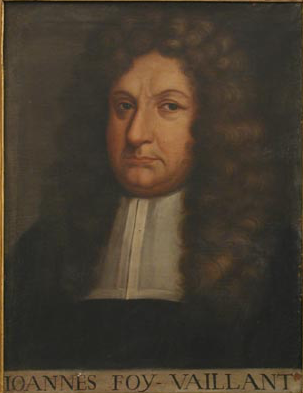 Jean Foy-Vaillant (1632-1706)